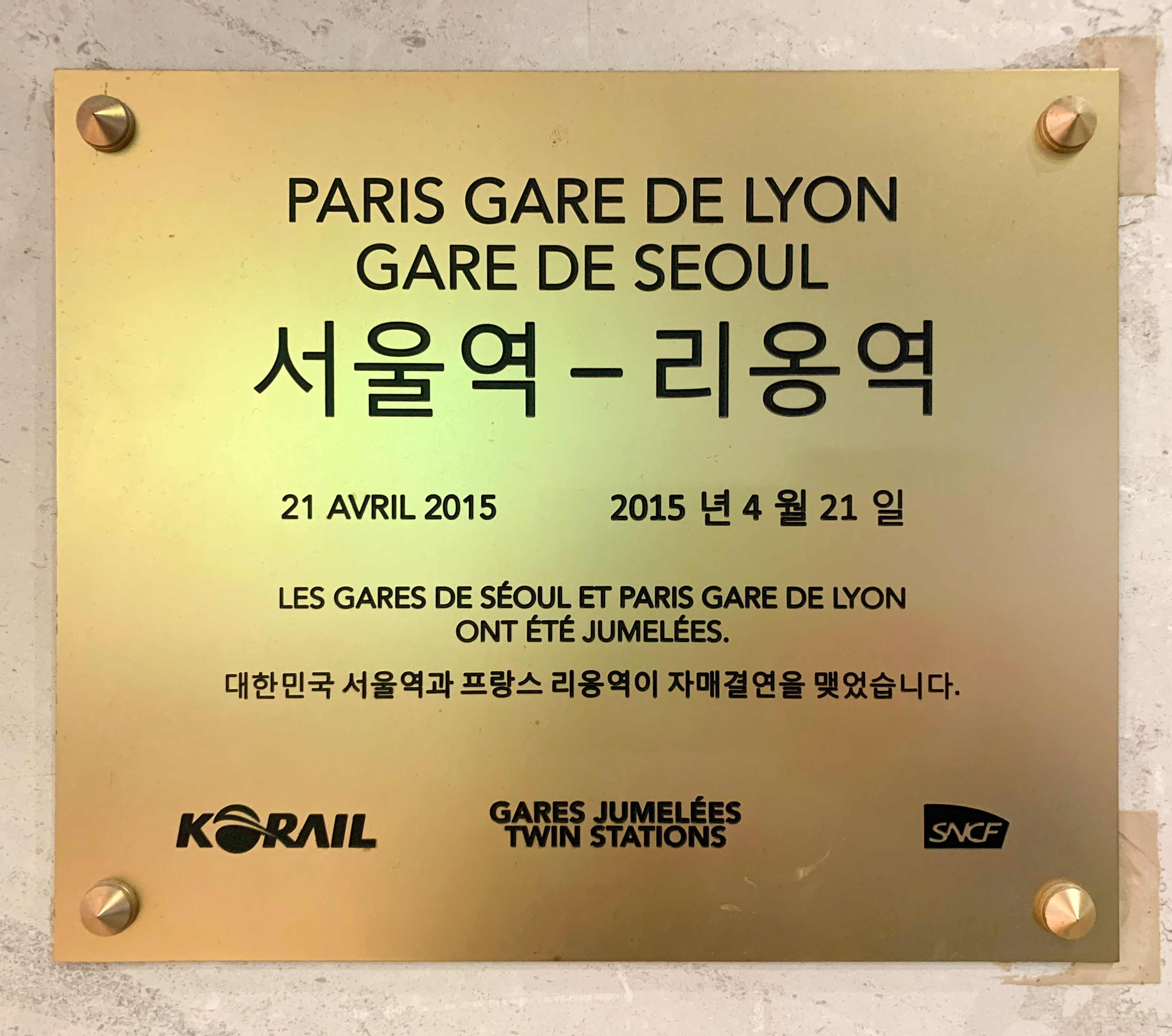 Plaque jumelage entre la gare de Lyon (Paris) et celle de Séoul.